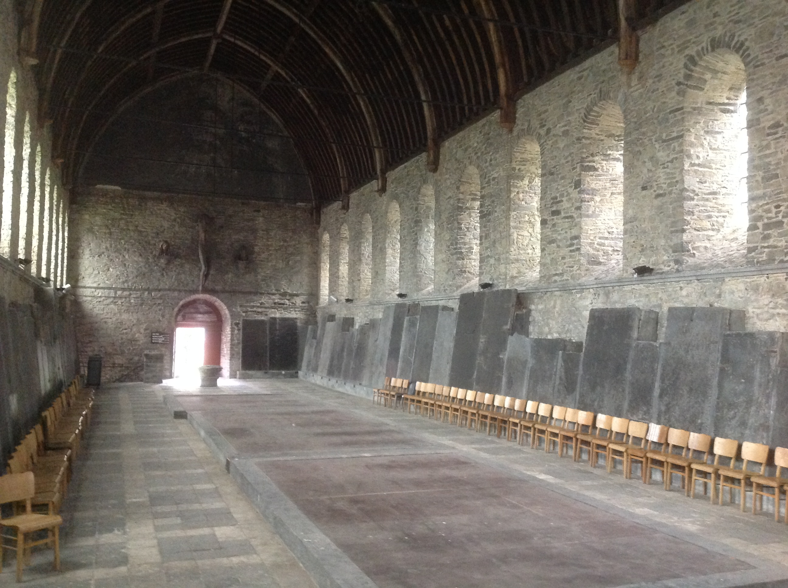 Prise de vue des vestiges du réfectoire de l'abbaye Saint-Bavon à Gand (Belgique). Photo de 2016.